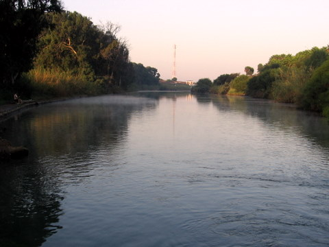 hadera stream